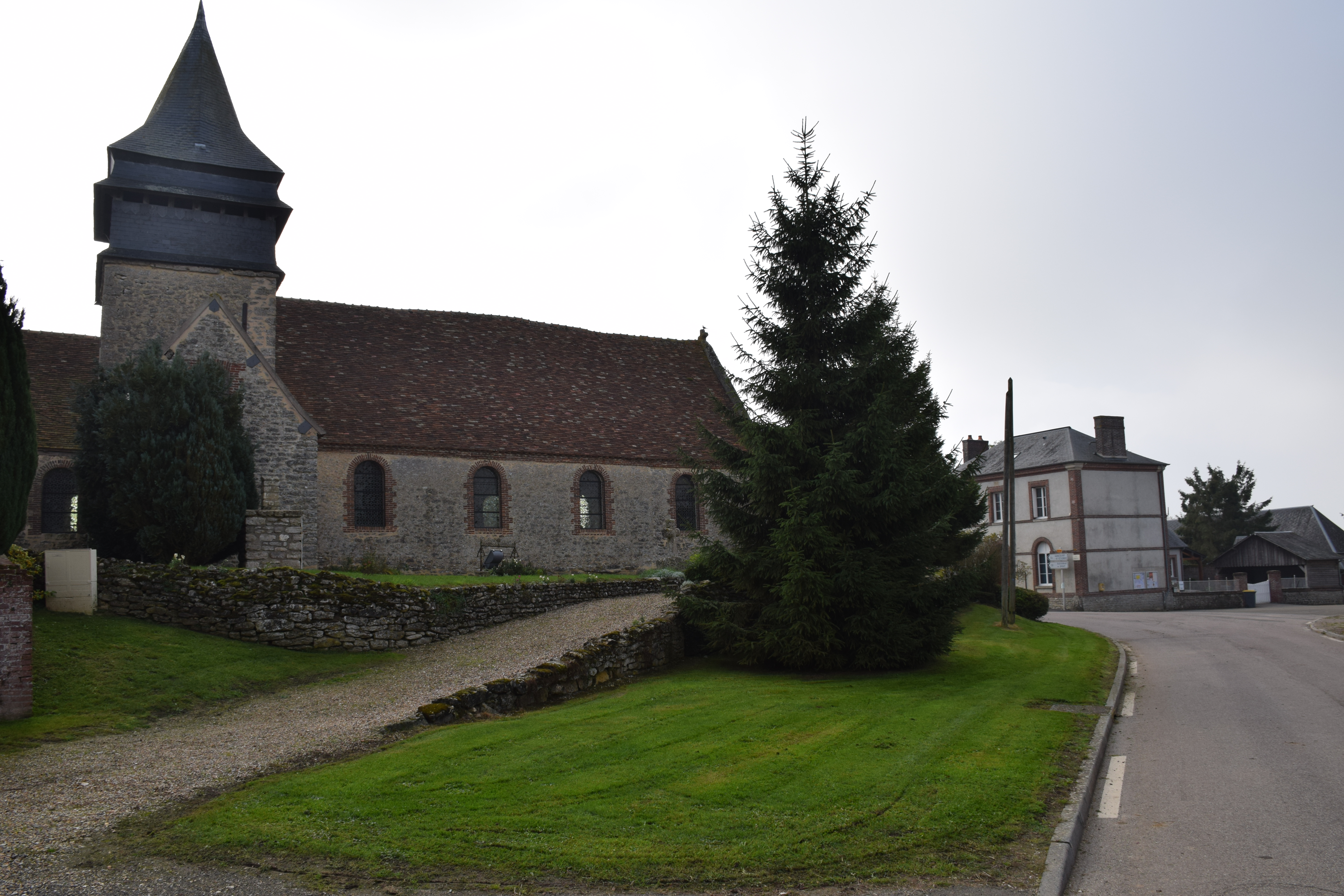 Eglise, Mairie